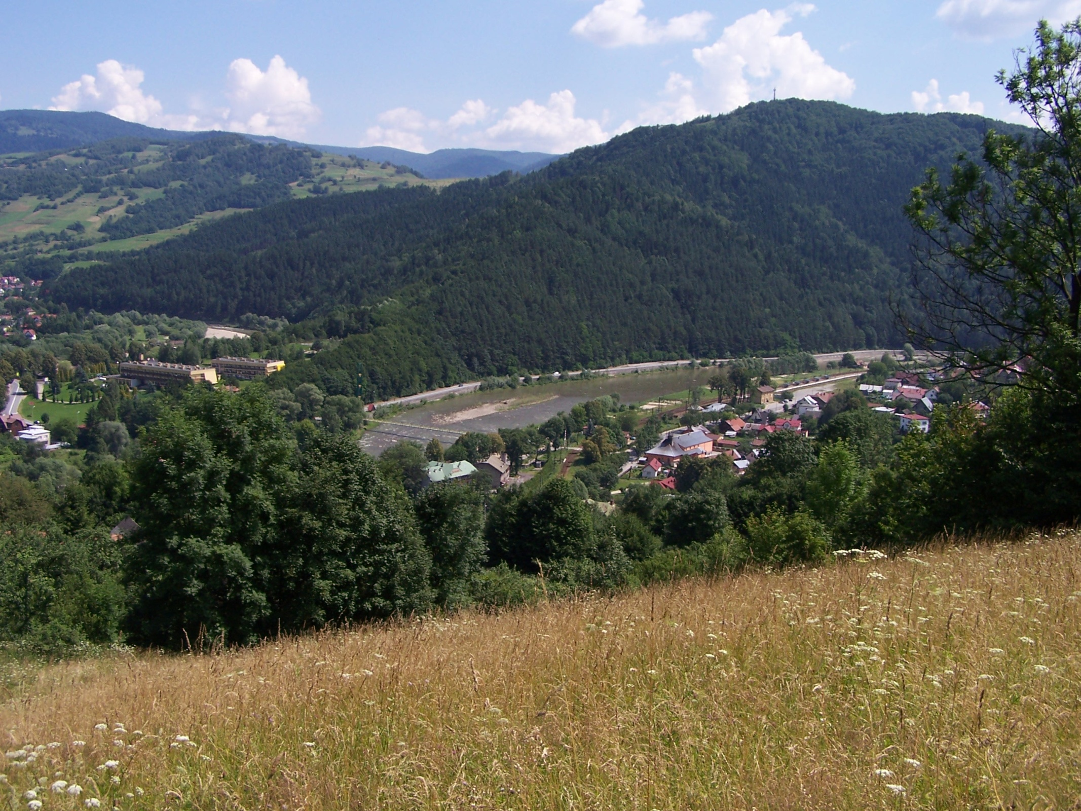 Góra Kicarz i leżące u jej podnóży miast Piwniczna-Zdrój